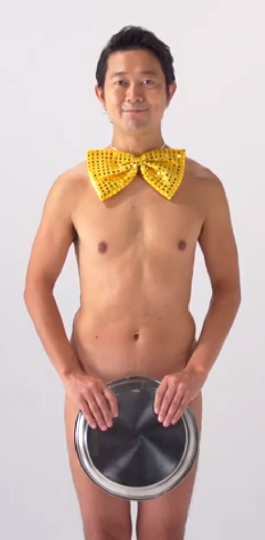 アキラ100%